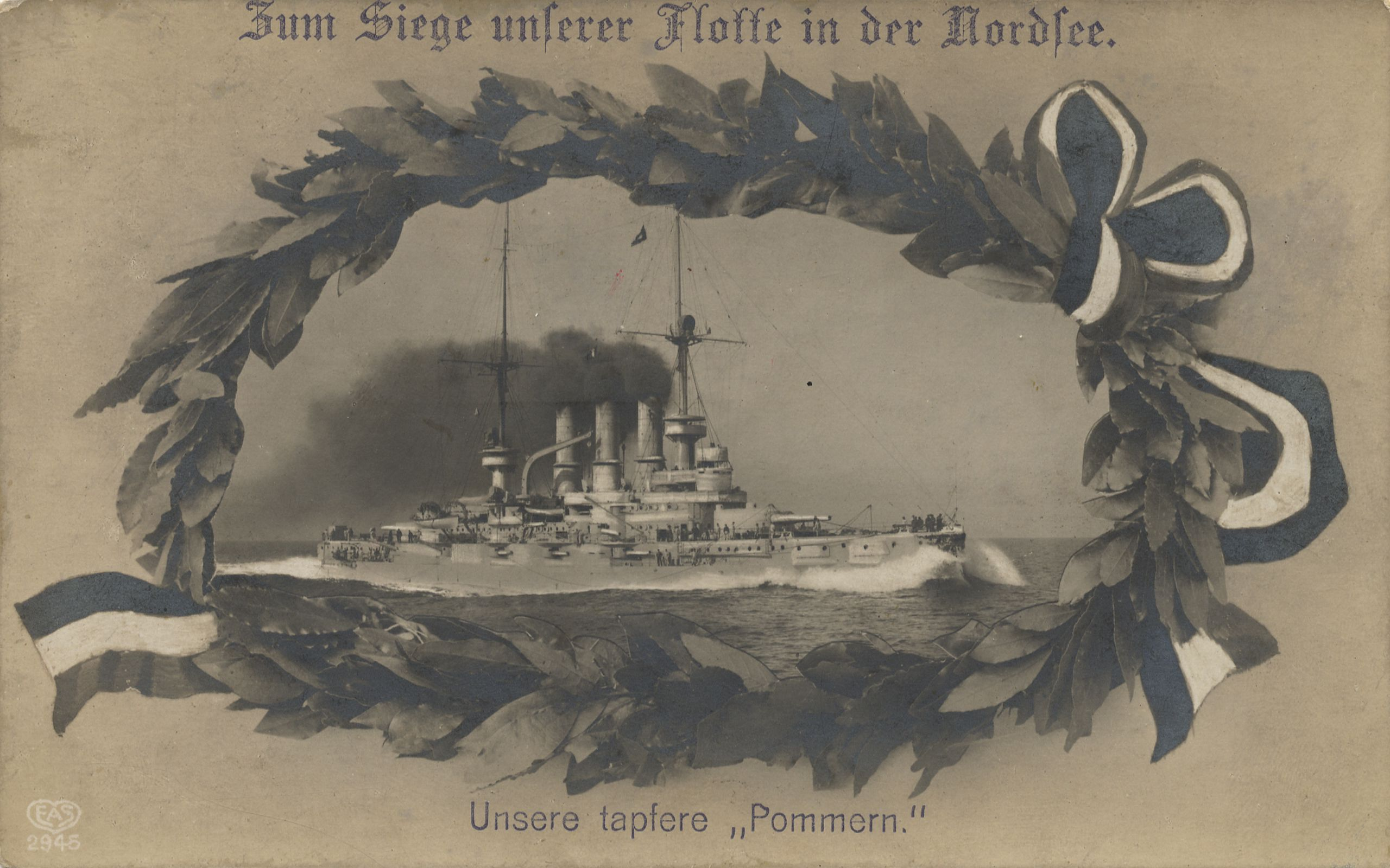 Zum Siege unserer Flotte in der Nordsee. Unsere tapfere „Pommern.“